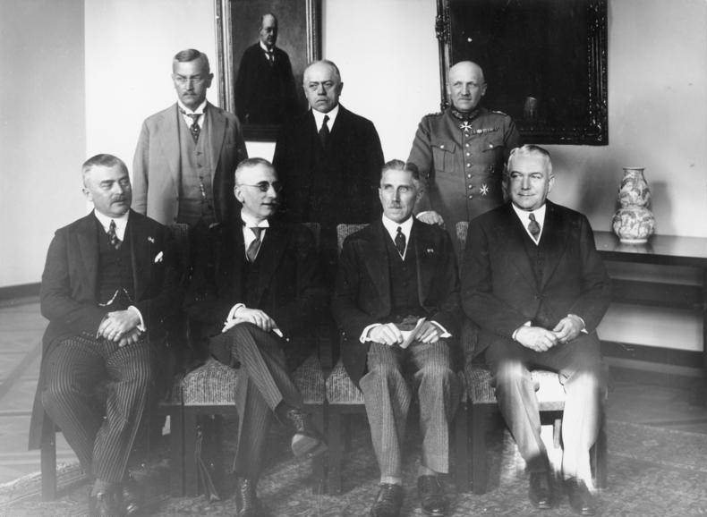 ADN-ZB, Deutschland, Neues Reichskabinett: 1. Juni 1932: Reichskanzler Franz von Papen bildet ein von Schleicher unter Mitwirkung von Schacht vorbereitetes Kabinett. Die Regierung ist ohne jede parlamentarische Mehrheit. UBz: Das neue Kabinett. Stehend vlnr: Dr. Franz Gürtner (Justiz), Dr. Warmbold (Wirtschaft), General von Schleicher (Reichswehr). Sitzend vlnr: Braun (Ernährung und Landwirtschaft sowie Ostkommissar), Wilhelm Freiherr von Gayl (Inneres), Reichskanzler von Papen, Konstantin Freiherr von Neurath (Äußeres). Information added by Wikimedia users.Kabinett Papen 1. Juni 1932 - 3. Dezember 1932 Im Bild fehlen: Lutz Schwerin von Krosigk (Finanzen), Paul Freiherr von Eltz-Rübenach (Verkehr, Post), ab 6. Juni Hugo Schäffer (Arbeit).